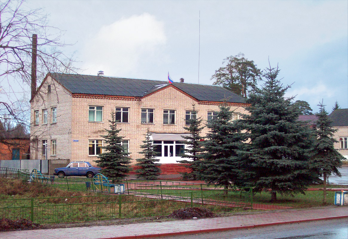 Администрация посёлка Пржевальское Смоленской области РФ